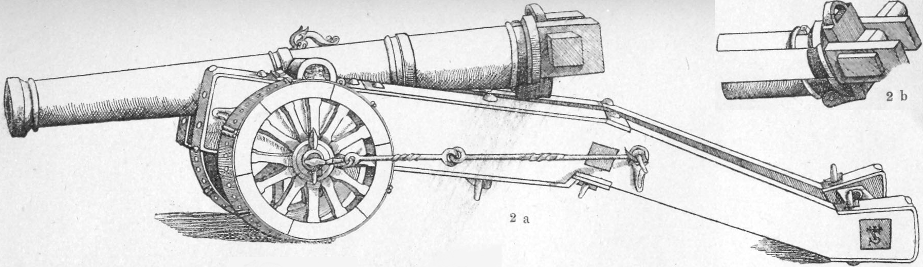 "Steinbüchse mit Hinterladungssystem" - two montaged fragments out of Image:16th Century Artillerie.jpg ("Artillerie um die Mitte des 16. Jahrhunderts" nach dem "Kriegsbuch" des Reinhard von Solms).